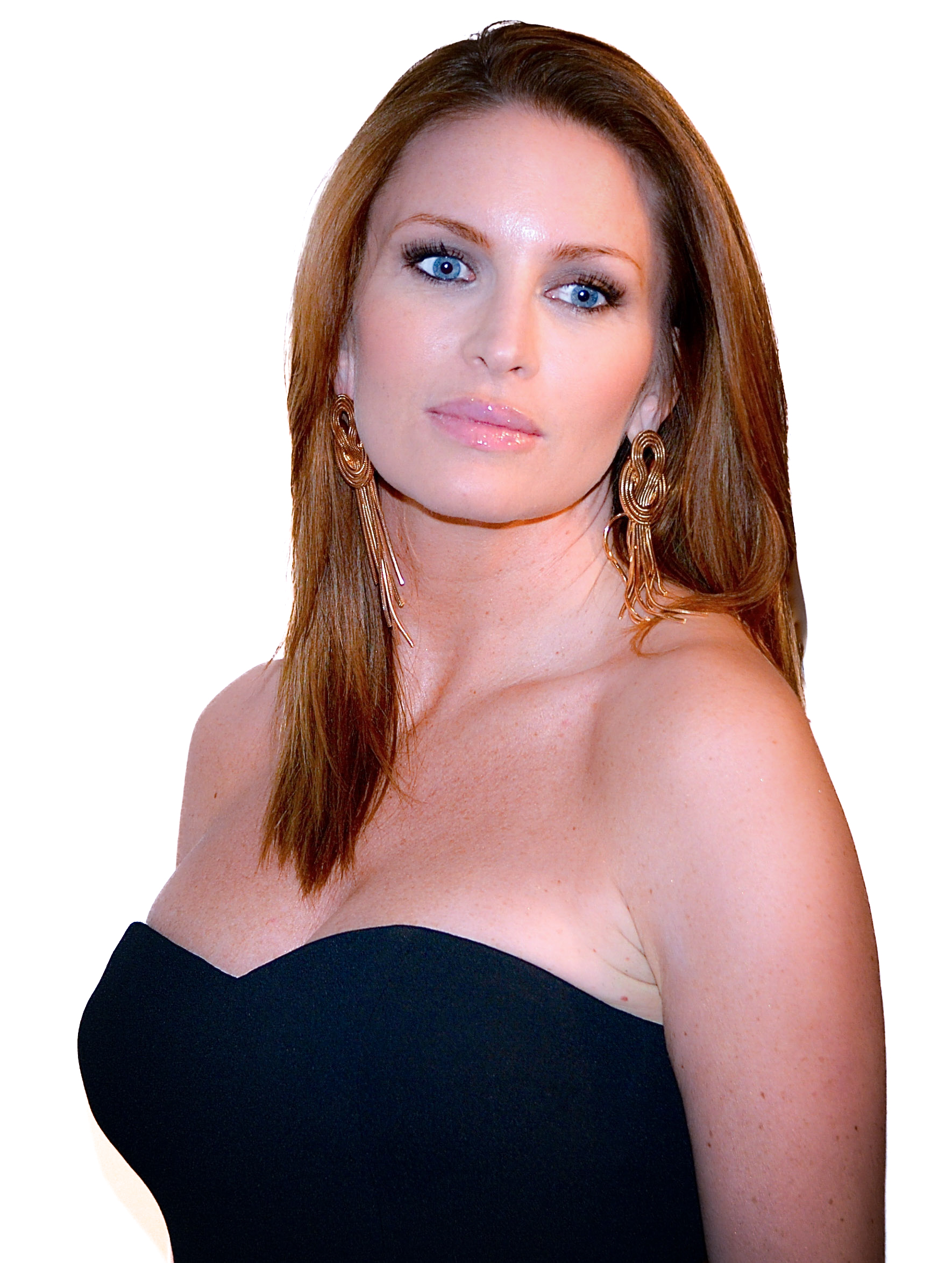 Carolina Gynning på Guldbaggegalan den 21 januari 2013.